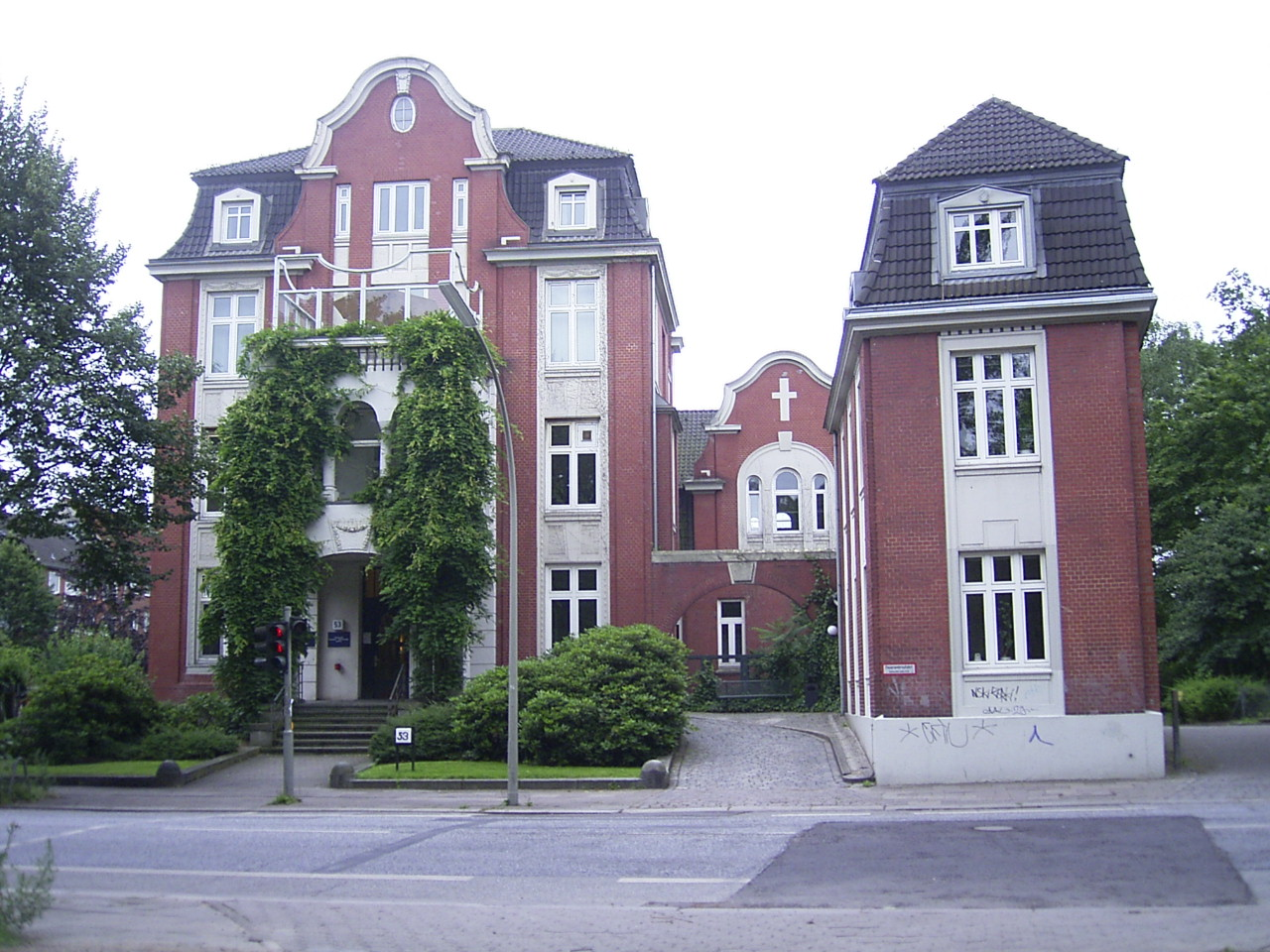 Haus 53 - frühere Abteilung für Psychiatrie und Psychiotherapie des Allgemeinen Krankenhauses Eilbek in der Friedrichsberger Straße 53 in Barmbek-Süd. Erbaut wurde das Gebäude für das damalige Ebenzer-Krankenhaus.This is a photograph of an architectural monument.